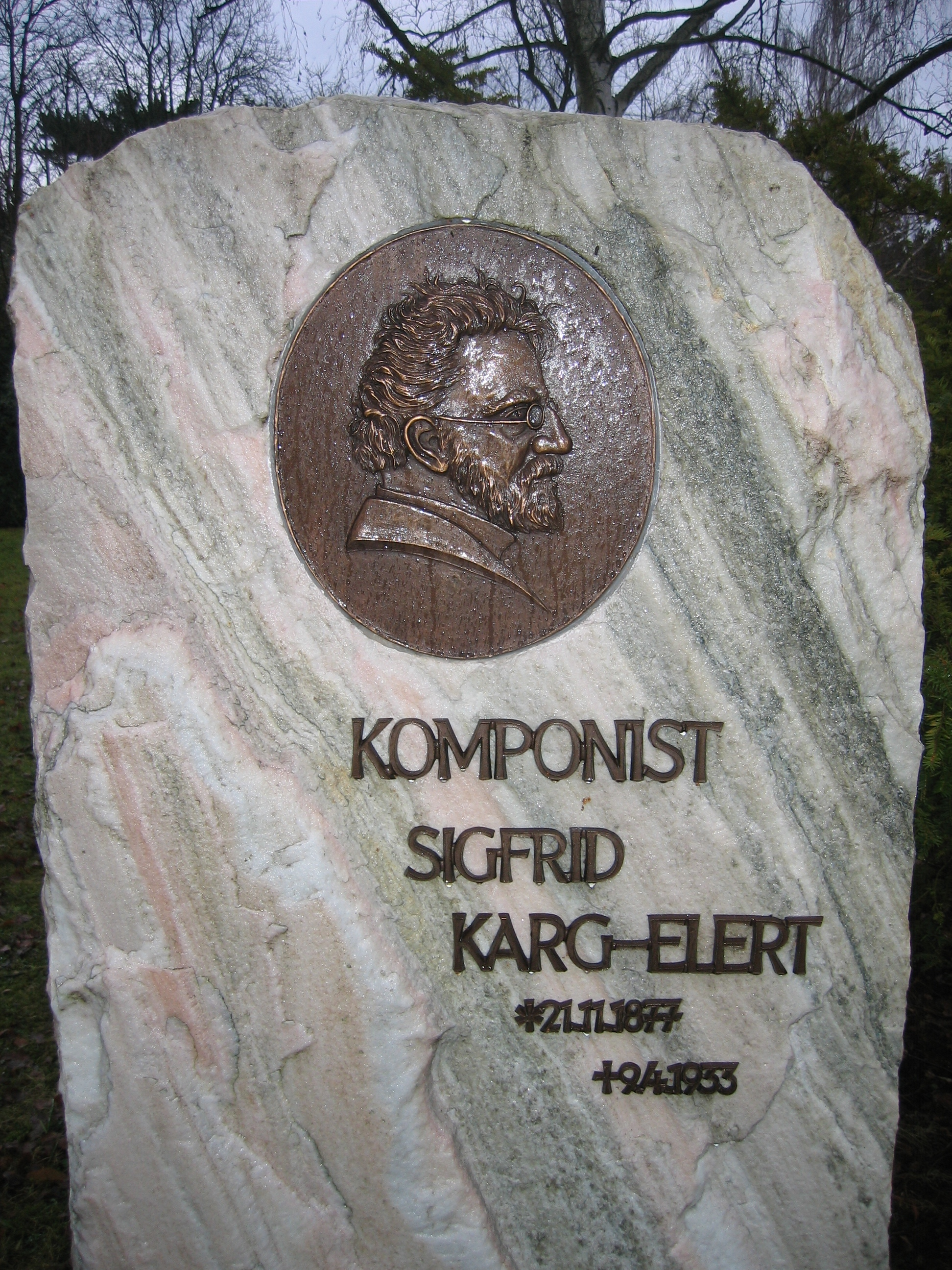 Das Grab von Sigfrid Karg-Elert auf dem Leipziger Südfriedhof